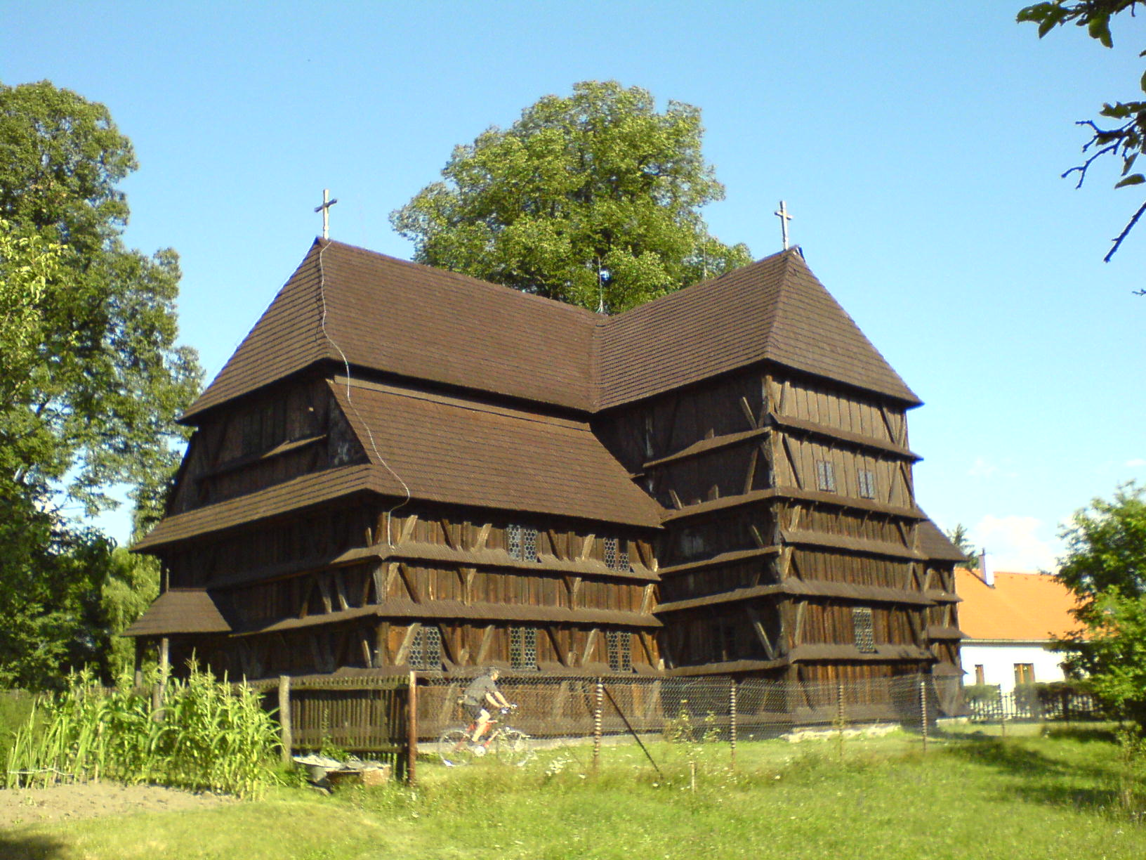 Drevený artikulárny kostol v Hronseku Wooden articular church in Hronsek